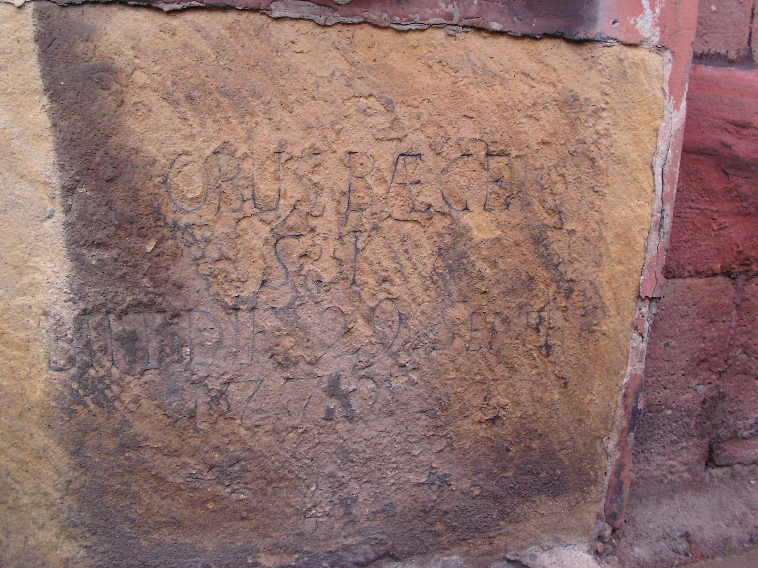 Jakob Baegert S.J., Missionar und Forschungsreisender, Grabplatte Neustadt an der Weinstraße